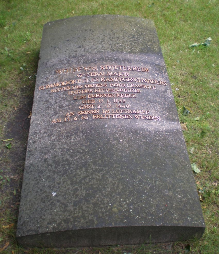 Grab Wolf von Stutterheim